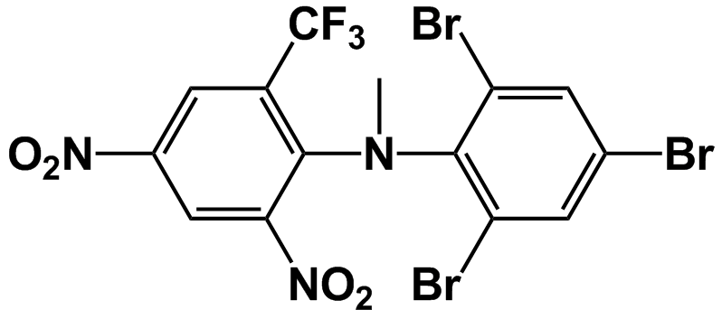 Brometalín, subakútny rodenticíd.